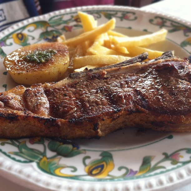 Entrecot.